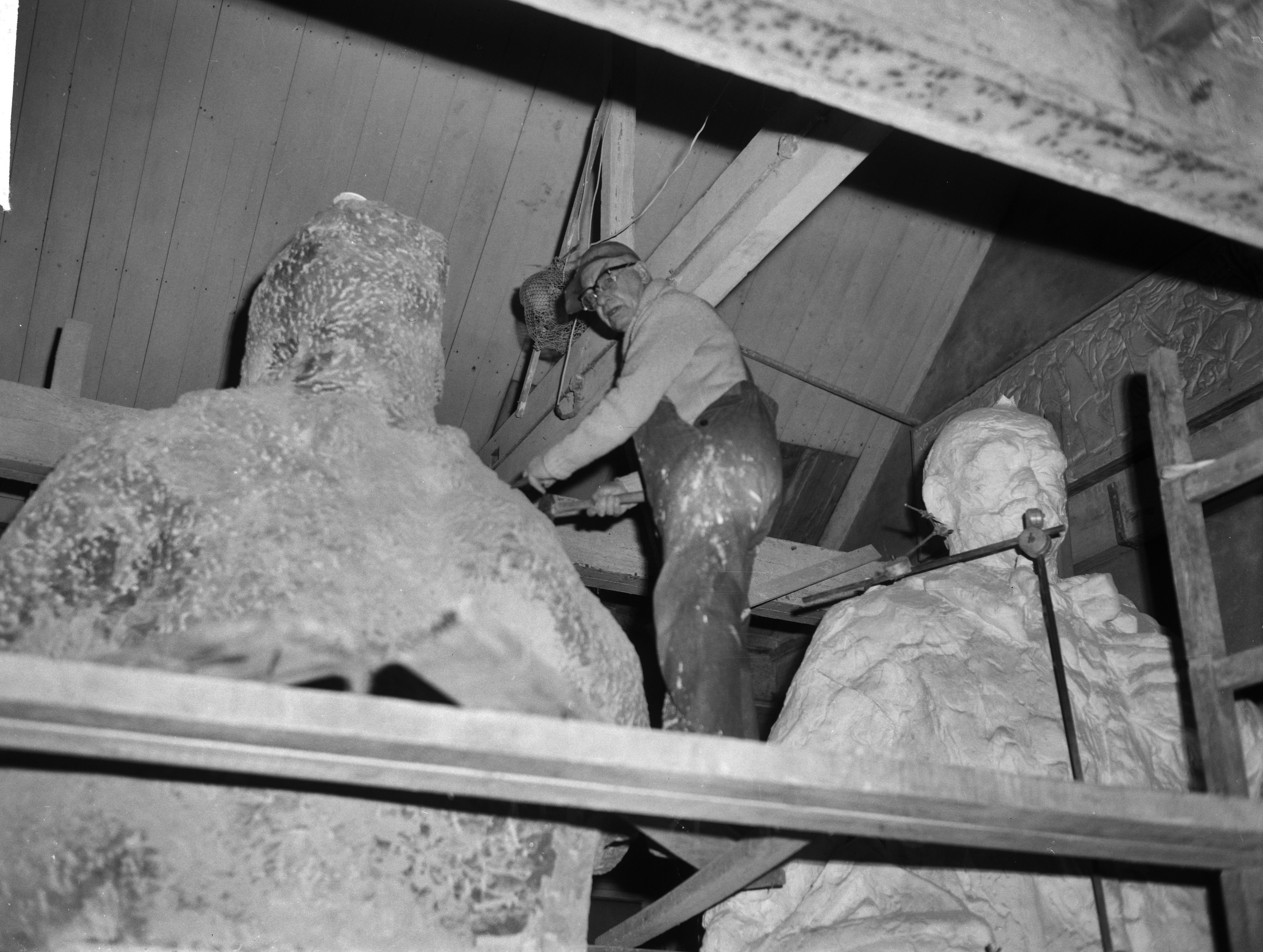 Collectie / Archief : Fotocollectie Anefo Reportage / Serie : [ onbekend ] Beschrijving : Hildo Krop, die 26 januari 80 jaar wordt, werkt aan een beeld van de architect H.P. Berlage Annotatie : Het standbeeld is geplaatst op het Victoriaplein in Amsterdam Datum : 19 februari 1964 Trefwoorden : beeldhouwers, beeldhouwkunst, kunstenaars Persoonsnaam : Krop, Hildo Fotograaf : Bilsen, Joop van / Anefo Auteursrechthebbende : Nationaal Archief Materiaalsoort : Negatief (zwart/wit) Nummer archiefinventaris : bekijk toegang 2.24.01.04 Bestanddeelnummer : 916-0684 Reacties Geplaatst door Kunstliefhebber op 08 september 2016 - 15:05. Hildo Krop die 26 februari 80 jaar wordt, werkt aan een beeld van de architect H.P. Berlage Locatie: Plantage Muidergracht Plaats: Amsterdam, Noord-Holland NB. januari dient februari te zijn